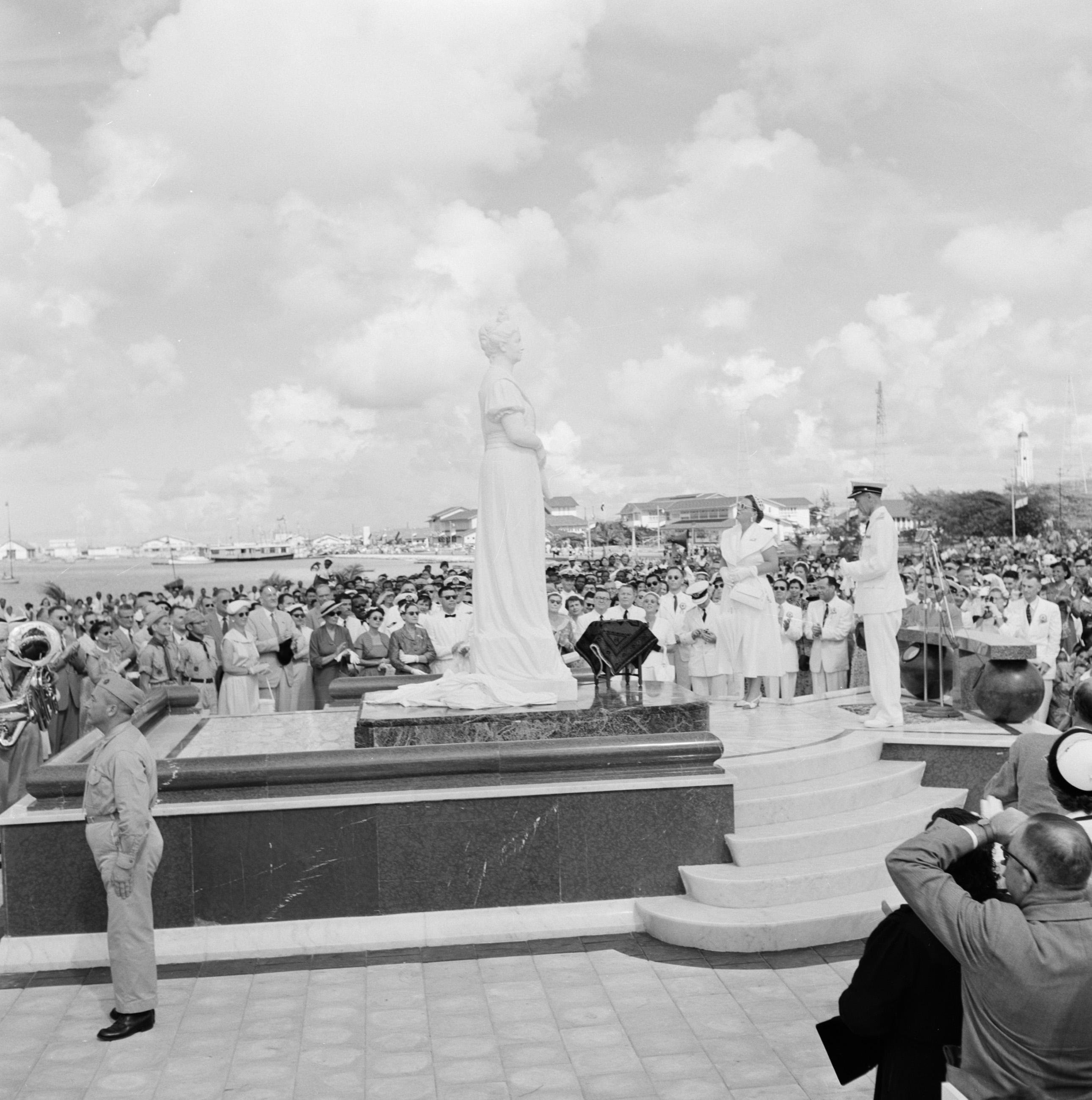 Collectie / Archief : Fotocollectie Van de Poll Reportage / Serie : Nederlandse Antillen en Suriname ten tijde van het koninklijk bezoek van koningin Juliana en prins Bernhard in 1955 Beschrijving : Onthulling door koningin Juliana van het Wilheminabeeld in het Wilhelminapark in Oranjestad, Aruba Datum : 24 oktober 1955 Locatie : Aruba, Oranjestad Trefwoorden : koninklijke bezoeken, standbeelden Persoonsnaam : Juliana, koningin, Wilhelmina, koningin Fotograaf : Poll, Willem van de Auteursrechthebbende : Nationaal Archief Materiaalsoort : Negatief (zwart/wit) Nummer archiefinventaris : bekijk toegang 2.24.14.02 Bestanddeelnummer : 252-3881